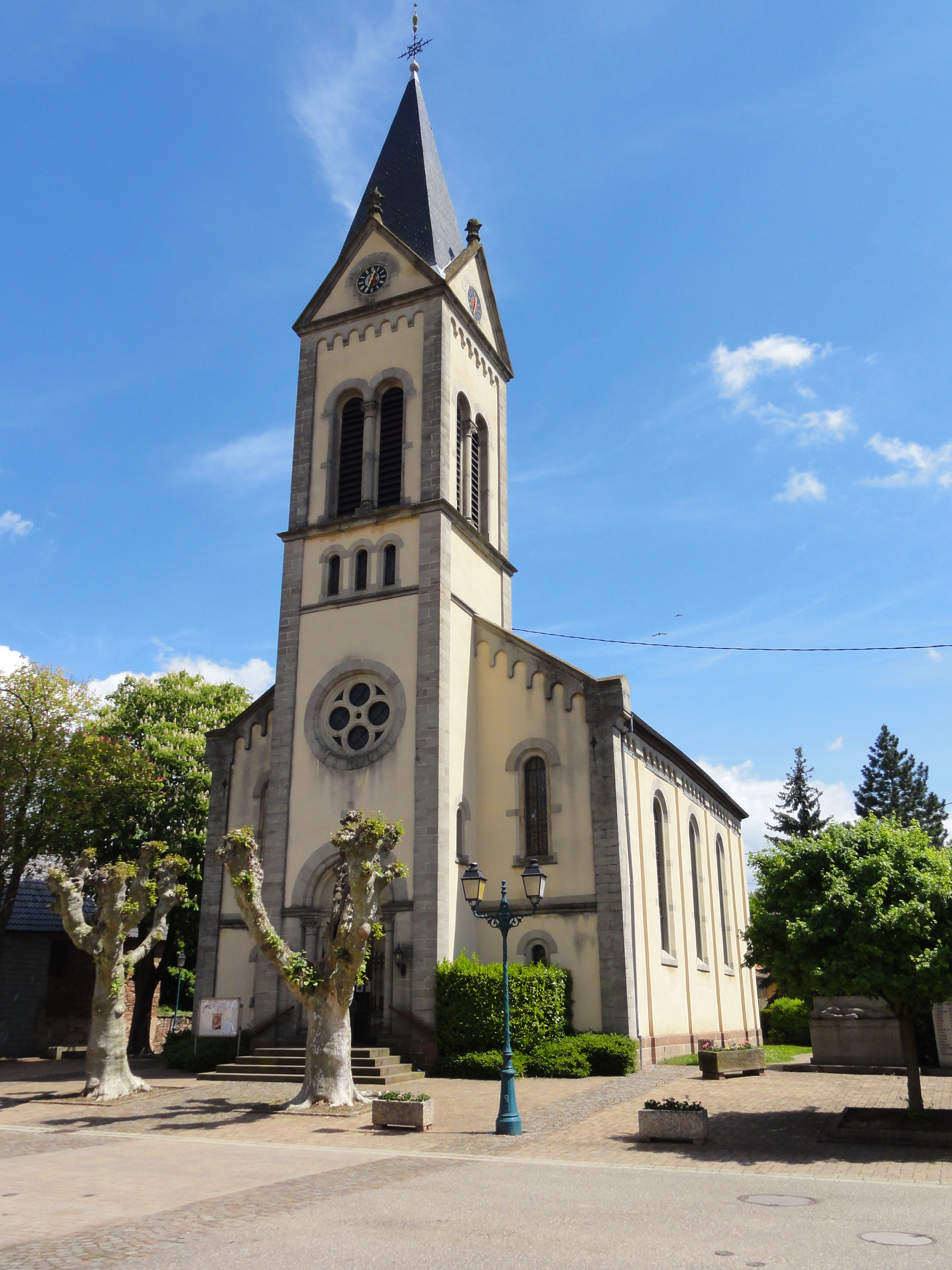 Alsace, Bas-Rhin, Melsheim, Église protestante Saint-Georges (1879)